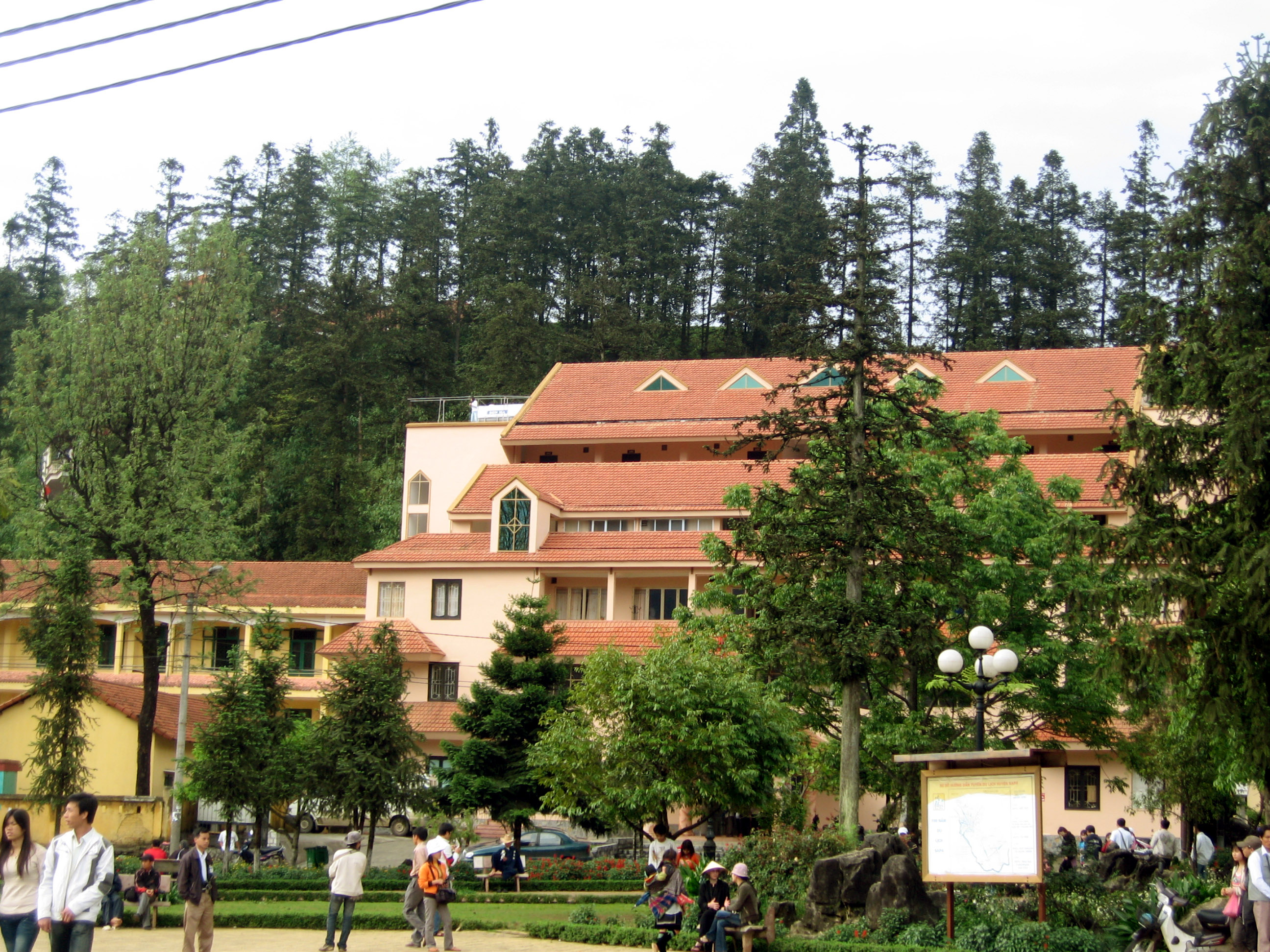 Công trình xây dựng tại Trung tâm Sa Pa